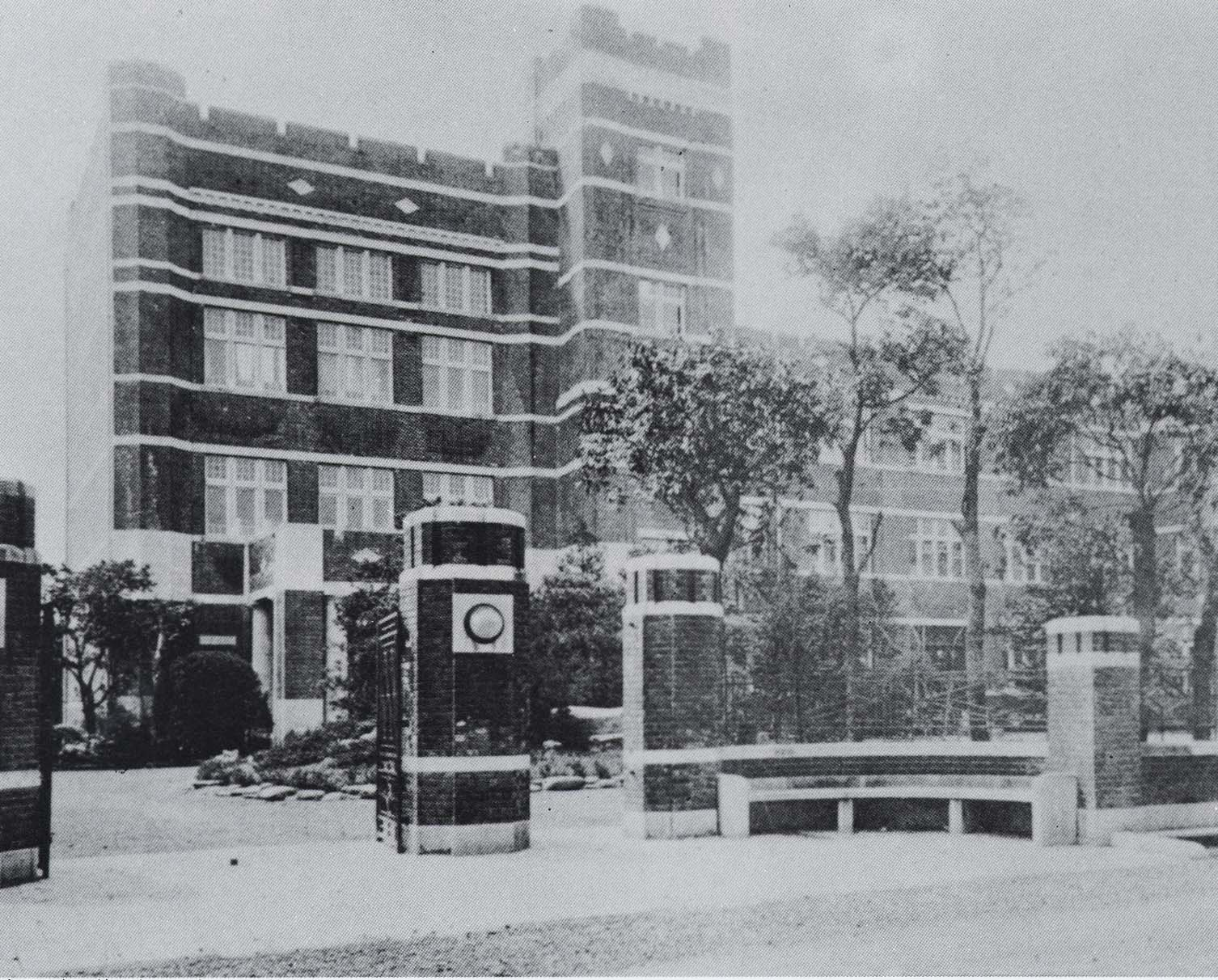 赤レンガ校舎